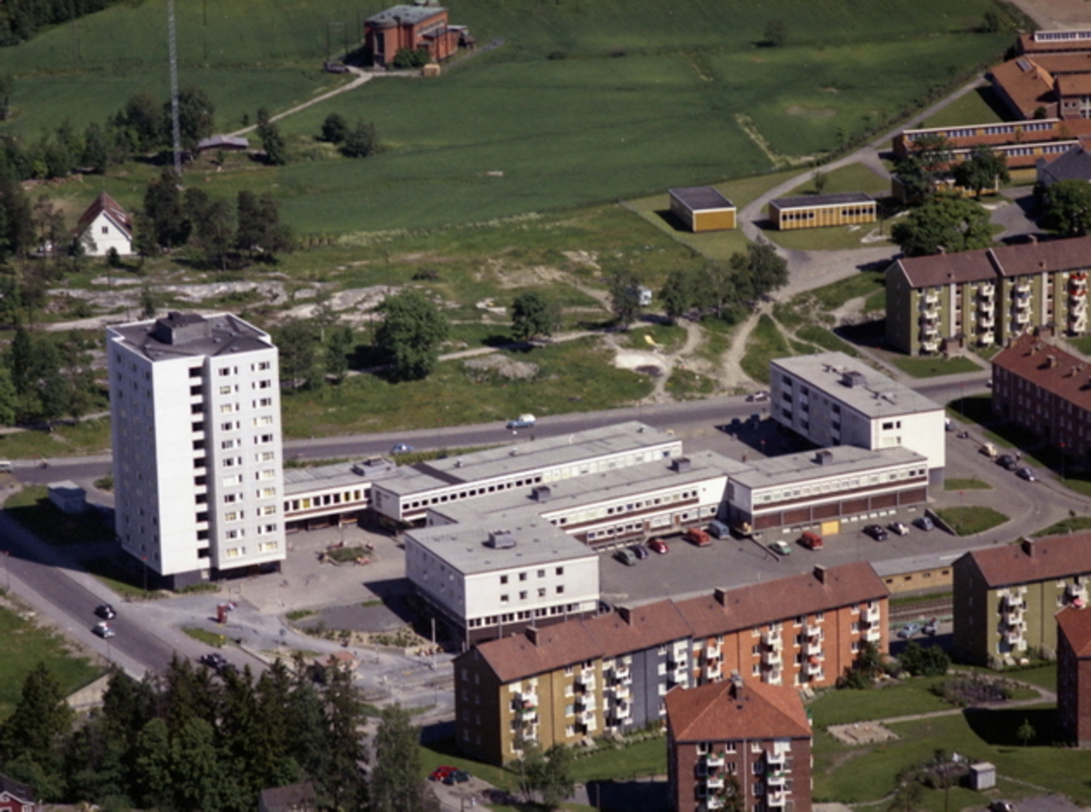 Flyfoto over Lambertseter senter 1962. Lambertseter skole bak til høyre